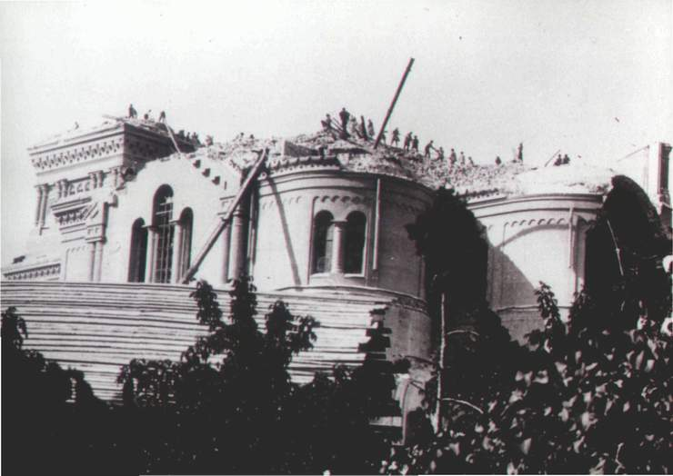 Разрушенный кафедральный собор Самары